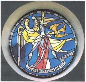 Peterswald